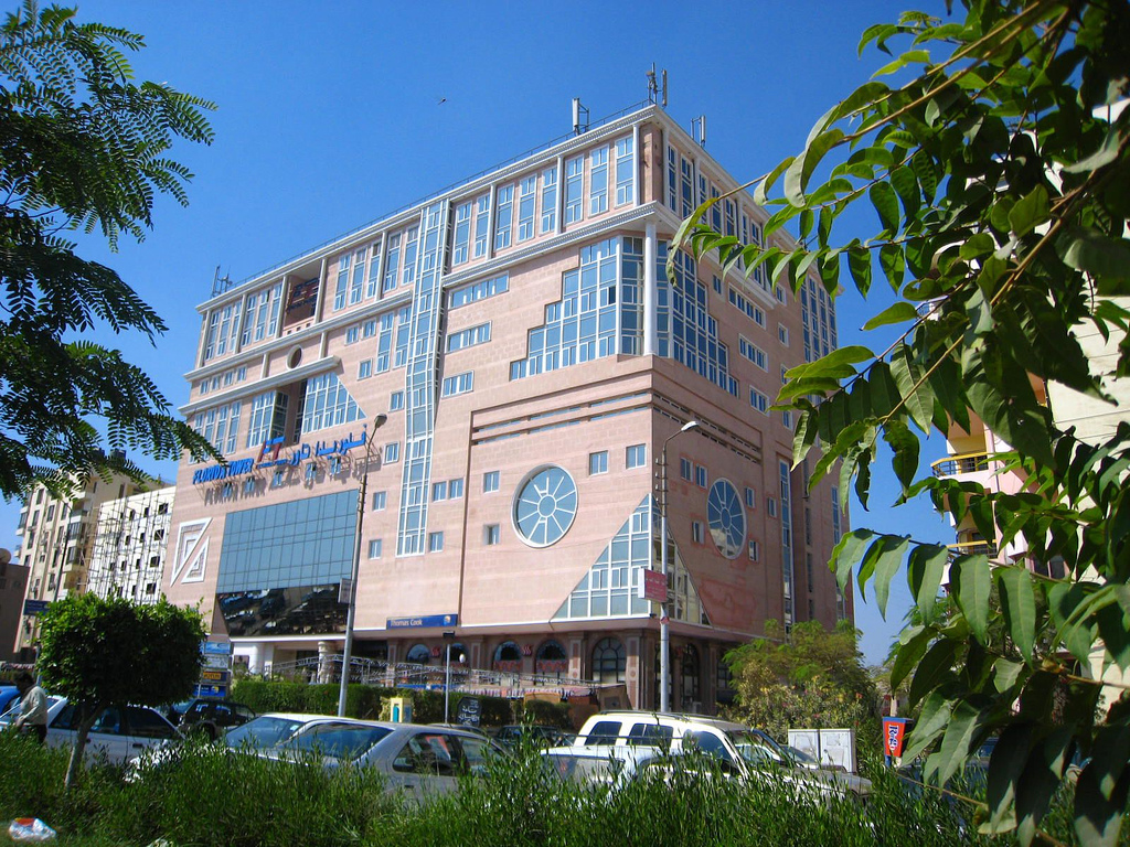 Florida Mall